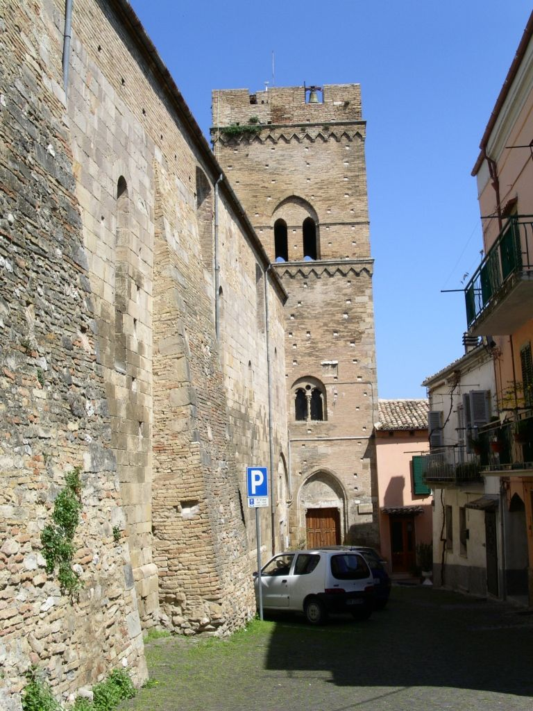 Chiesa di San Biagio, dettaglio del campanile. Foto scattata da me. Lanciano (CH), 7 aprile 2007.